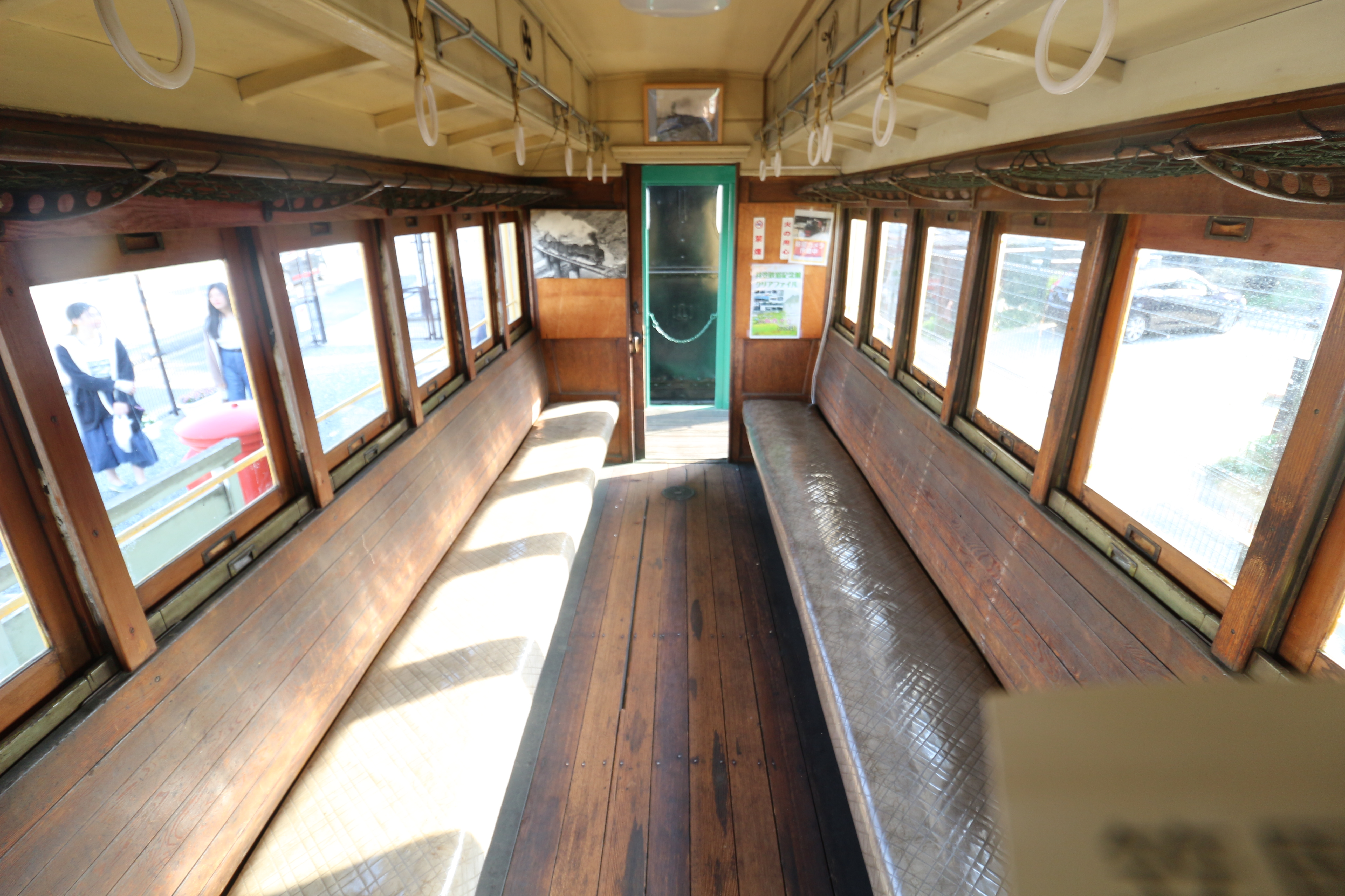 ホハ1内部 木造客車。1913年、日本車輌製。岡山県笠岡市井笠鉄道記念館保存